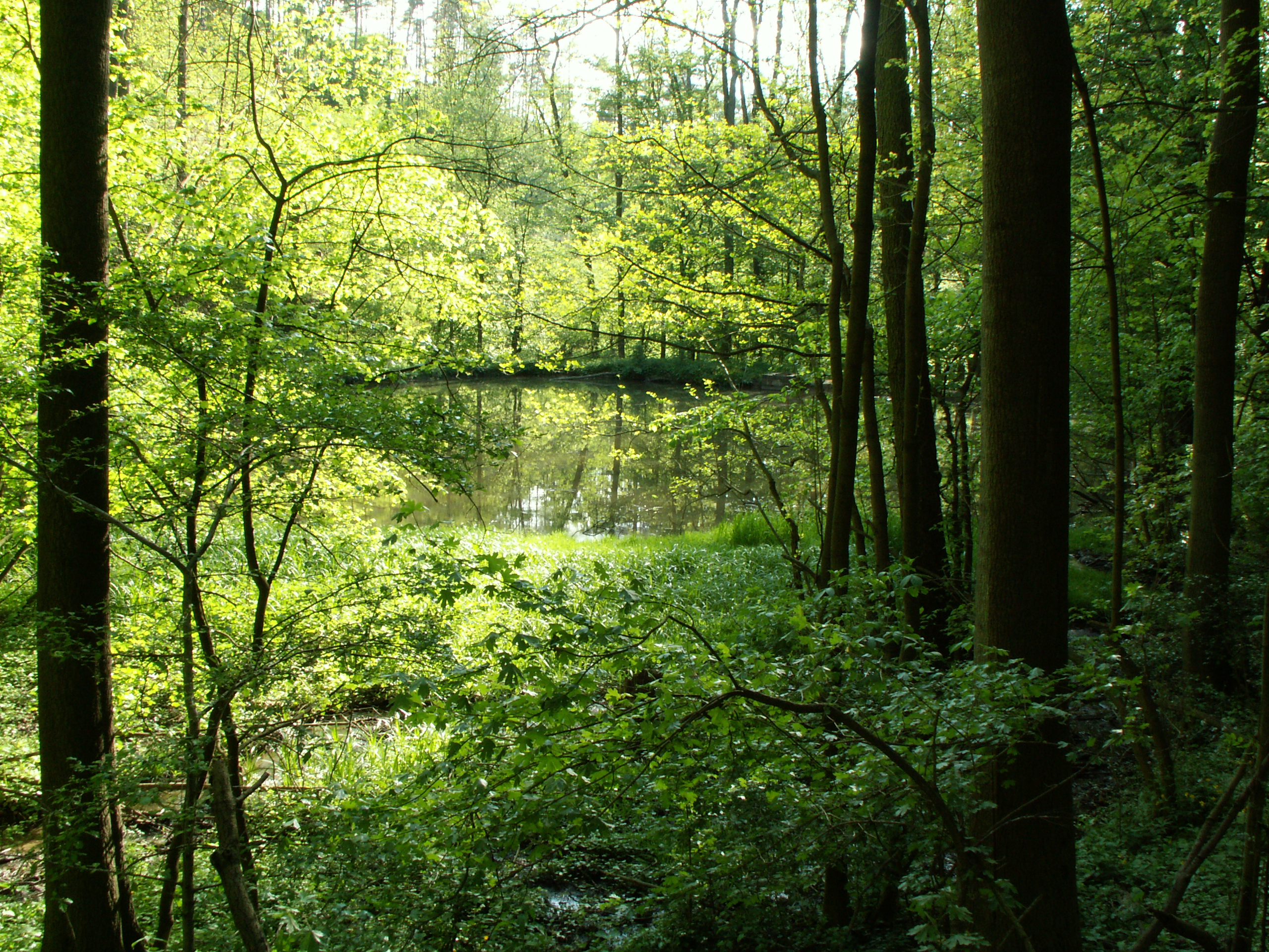 Česky: Dolní ze Soběšických rybníčků fotografovaný z hráze horního. Dole v trávě se klikatí potok Kubelín.